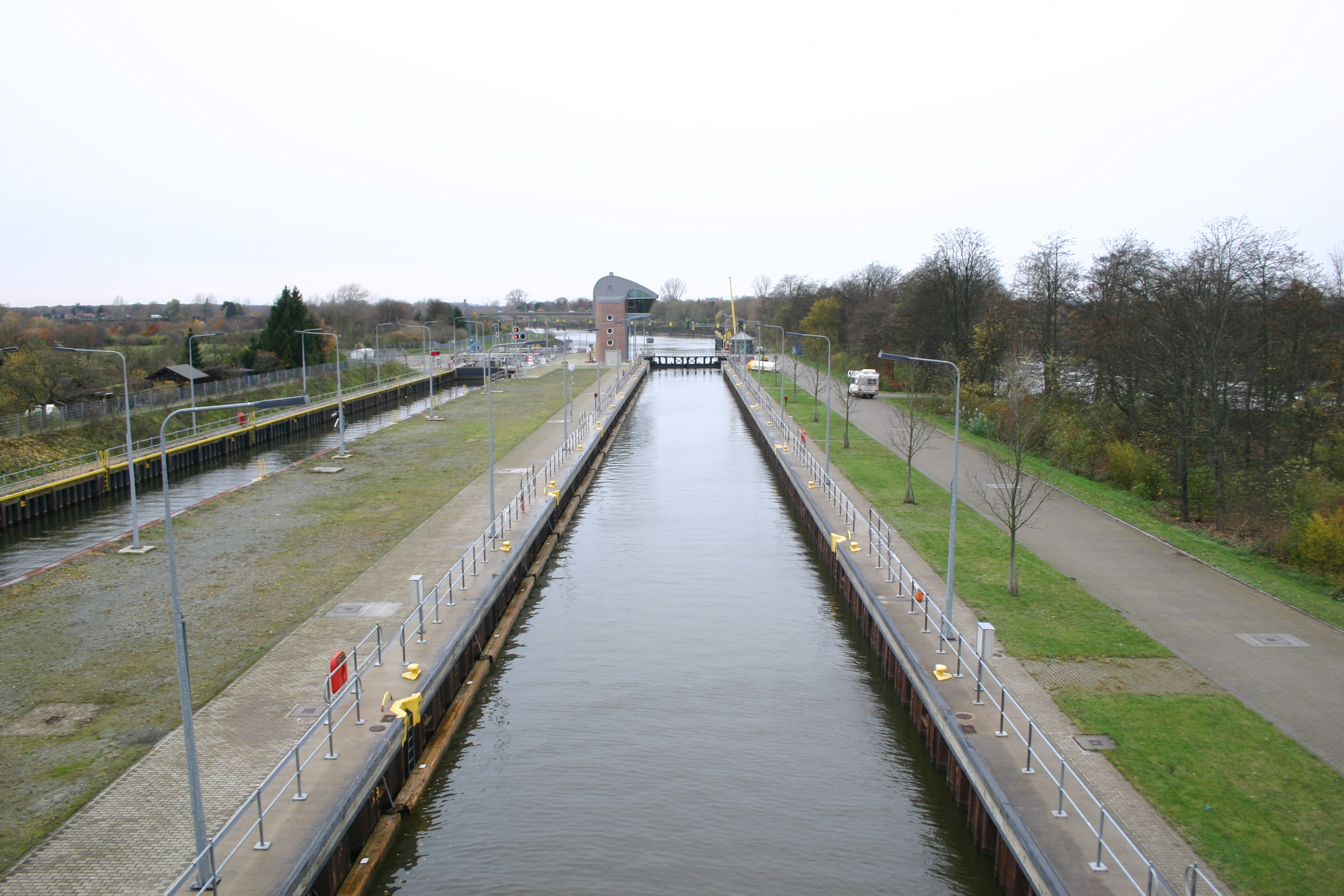 Weserwehr Bremen, from Upstream